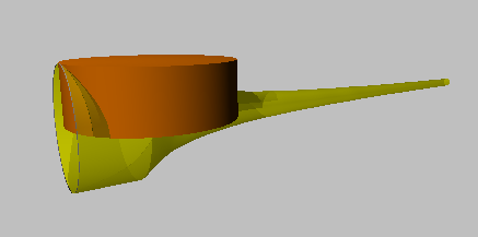 Volume de la trompette de Gabriel par la méthode de Cavalieri - Etape 3